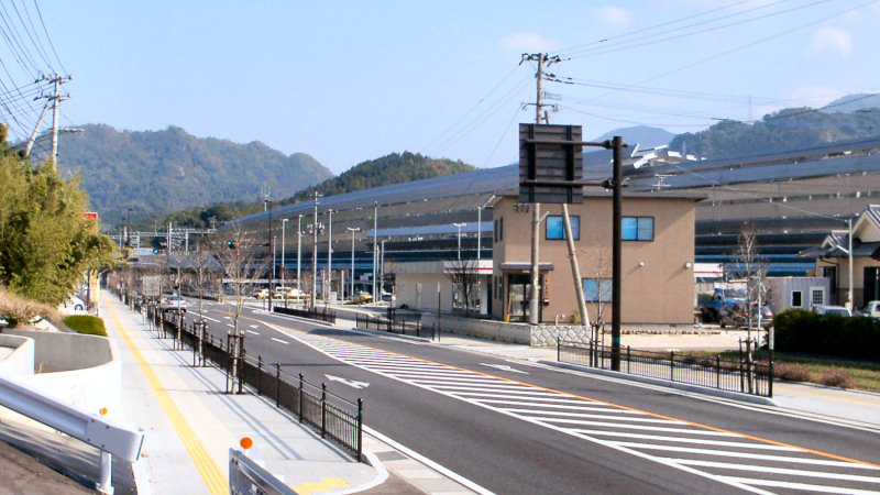 新水俣駅 駅前風景 道路は国道3号、手前側に進むと水俣市の中心市街地。 撮影者/著者/著作権保有者 : MK Products (本人がアップロード) 撮影日 : 2004/11/23 新水俣駅用にアップロードした画像です。良い画像があれば別の画像に変えてください。